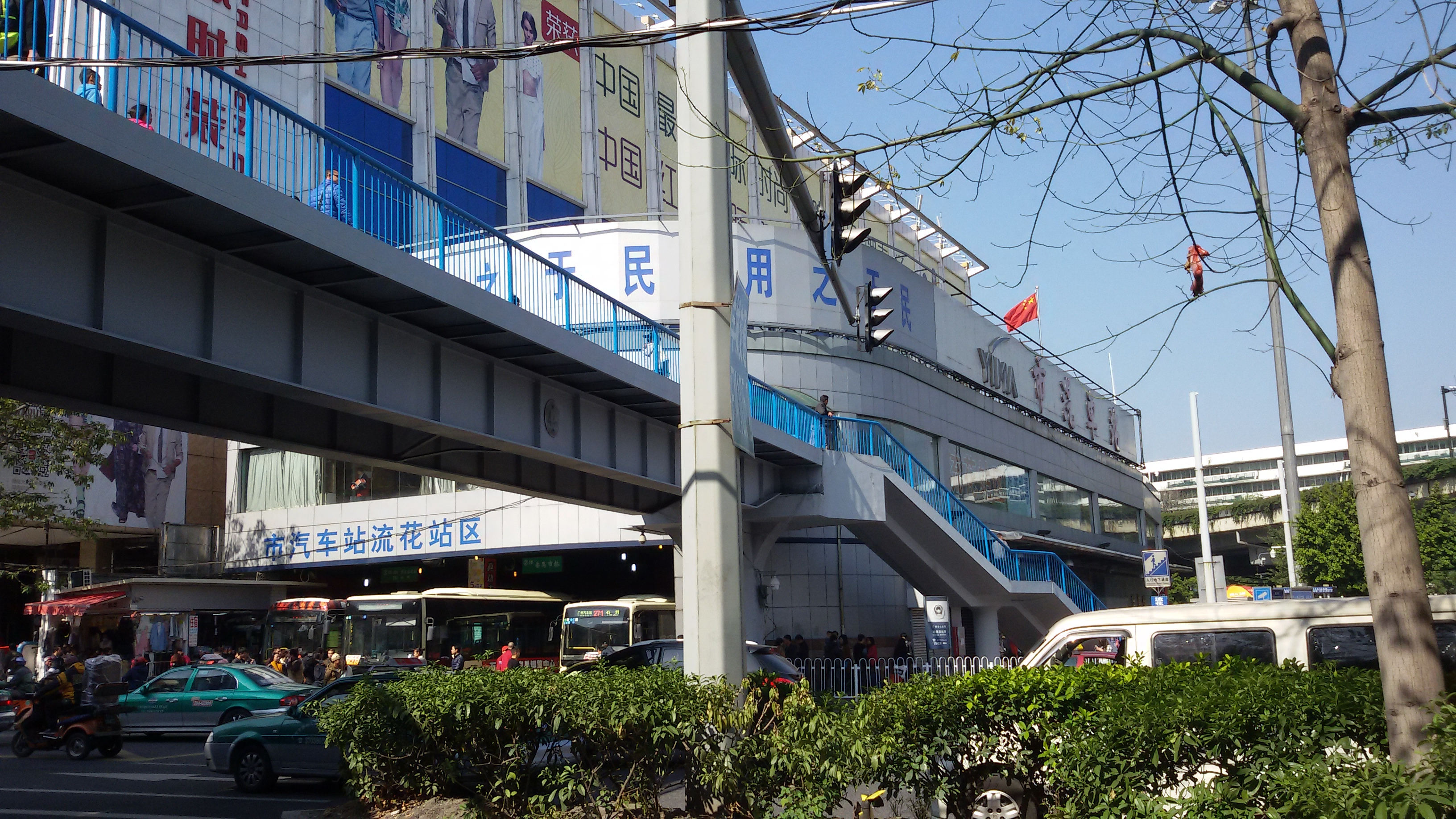 粵語: 廣州市汽車站